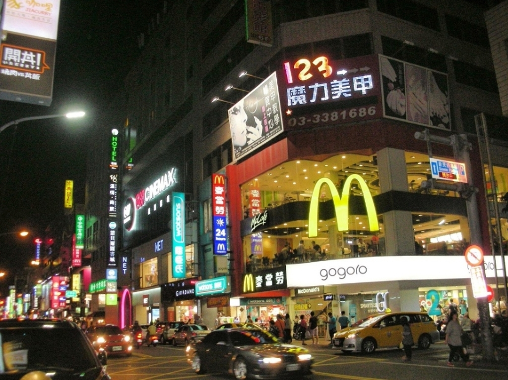 桃園市桃園區 中正路商圈夜景。